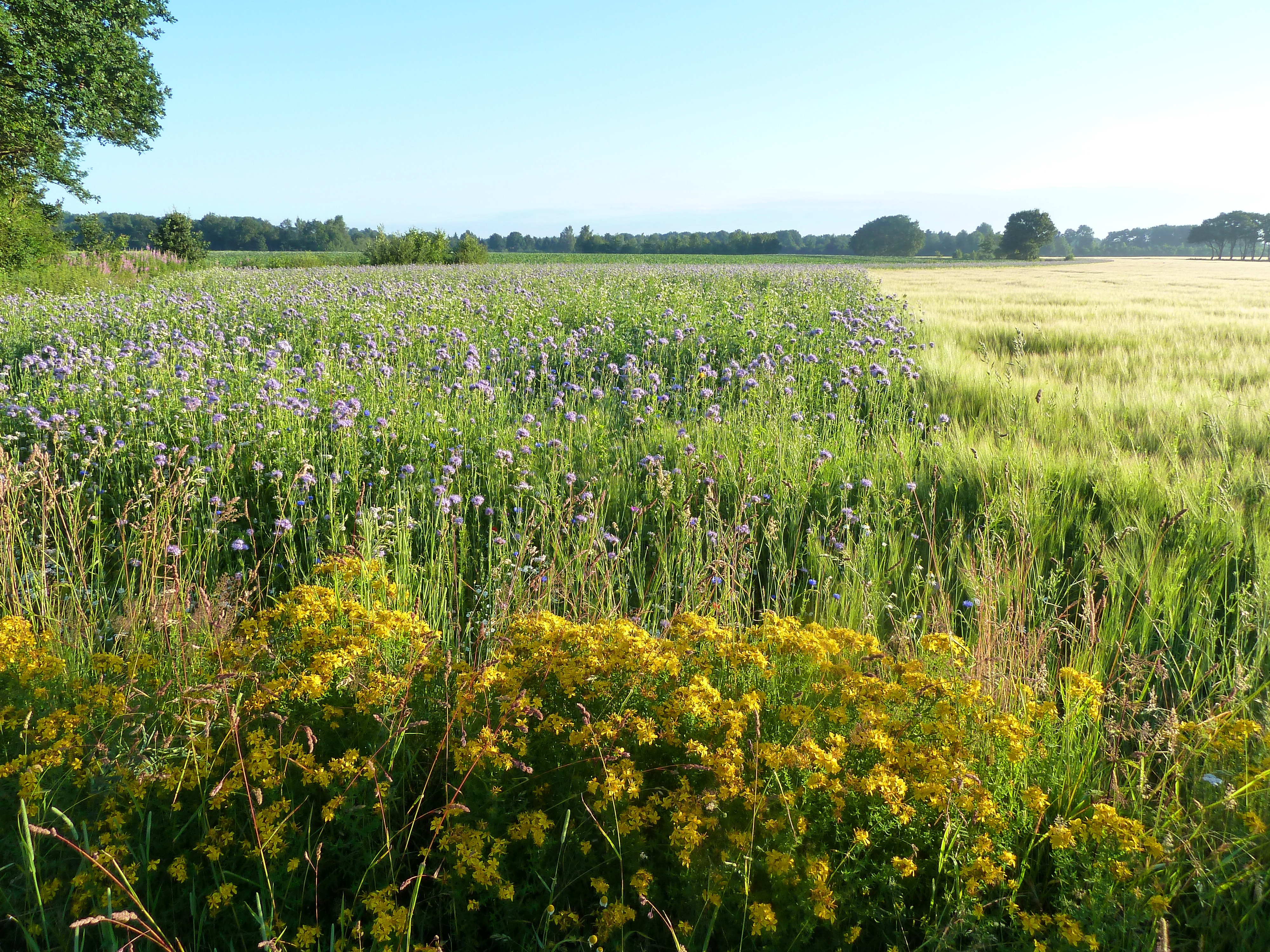 Faunarand langs een akker in Drenthe ten zuiden van Assen